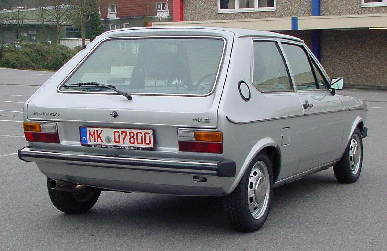 Audi 50 GLS Baujahr 1978 Einer mit der seltenen Typschlüsselnummer 500 und somit HH Motor mit 1,3 Litern Hubraum